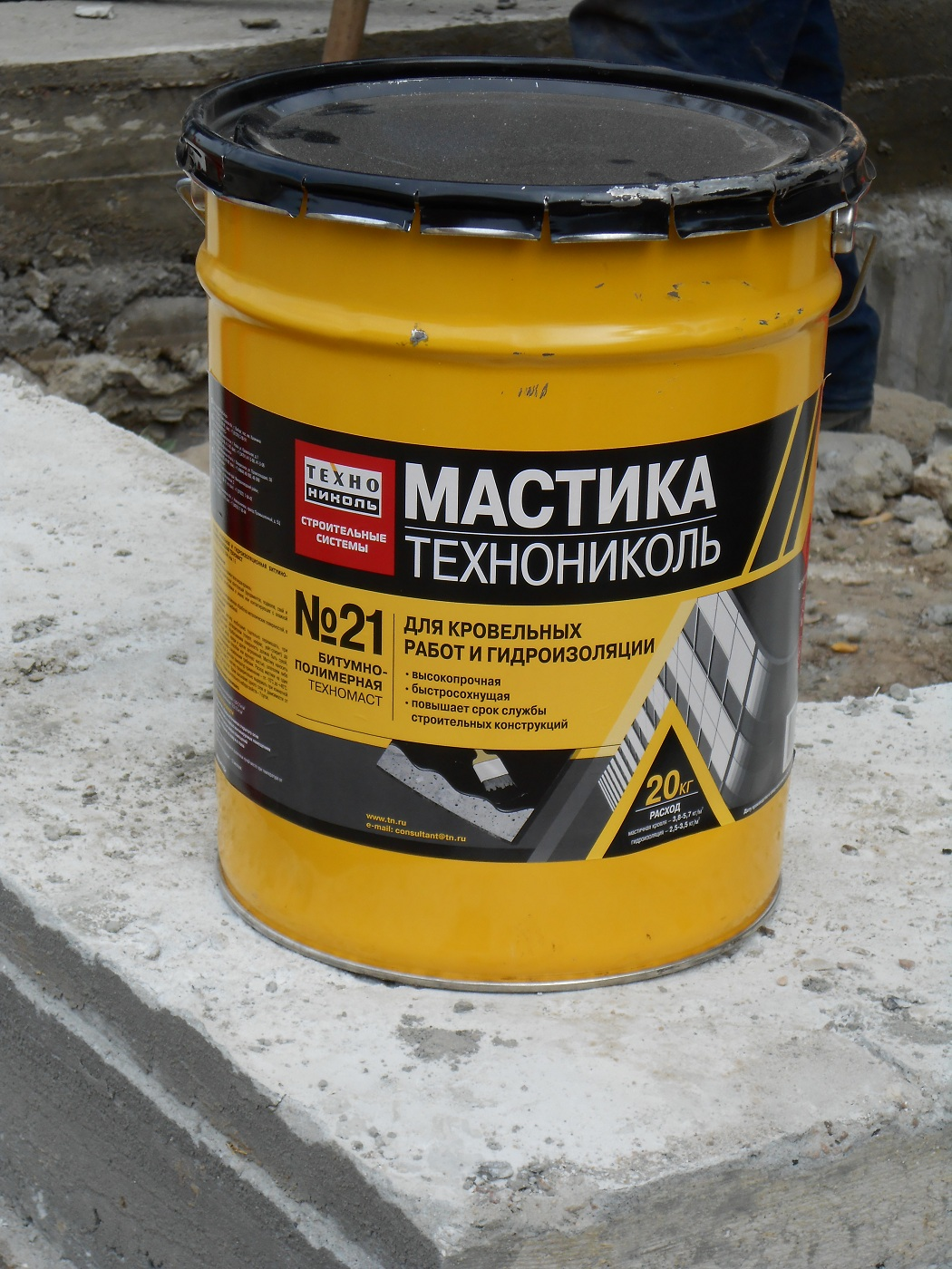 Банка в мастикой технониколь 20 кг.